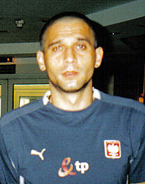 Radosław Kałużny